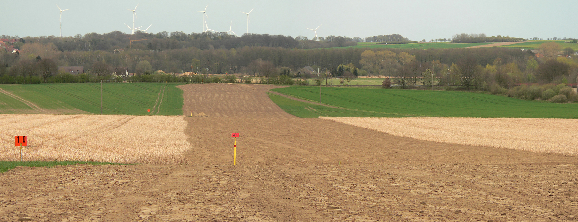 Pipelinetrasse in der Geestlandschaft bei Gessel, Blick vom Heidberg in Richtung Nordost auf die Bahnstrecke und einige Häuser von Gessel